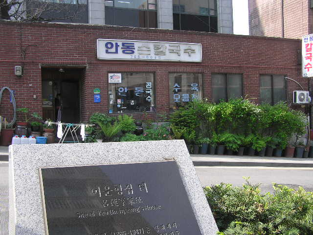 서울 계동의 여운형 자택이었던곳. 지금은 음식점으로 되있다.